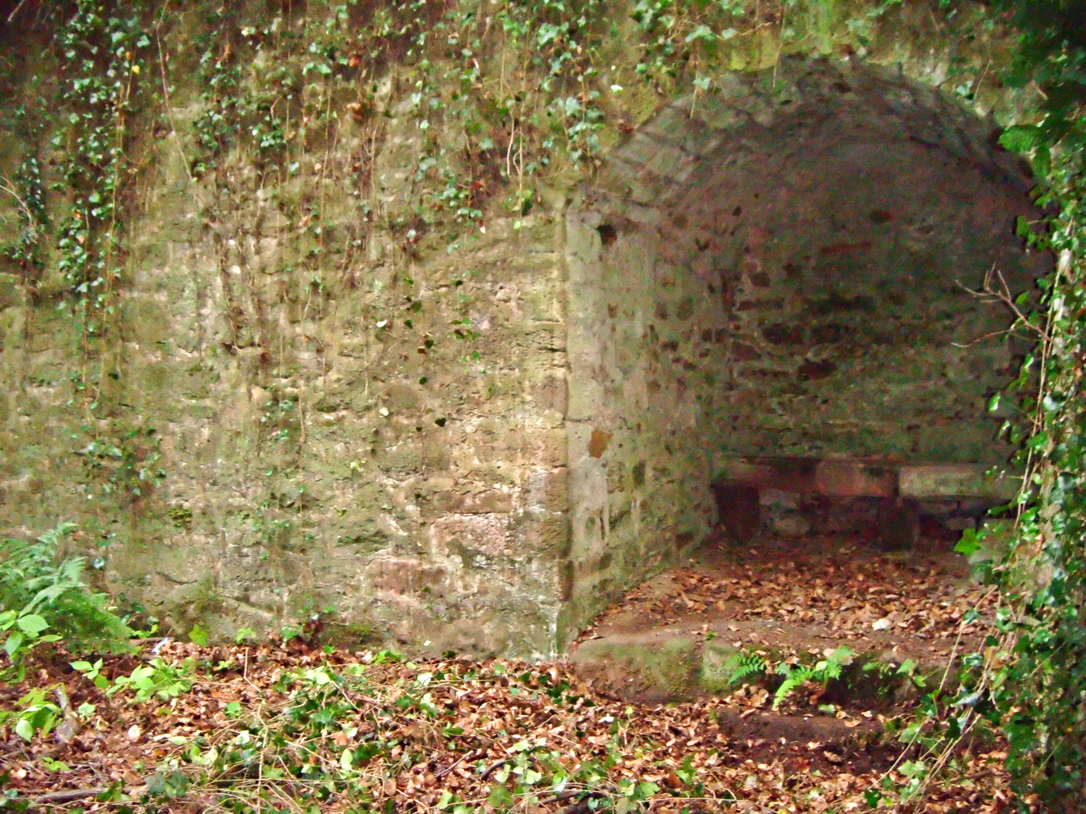 Neuleiningen-Tal, Rheinland-Pfalz, Historischer Waschplatz